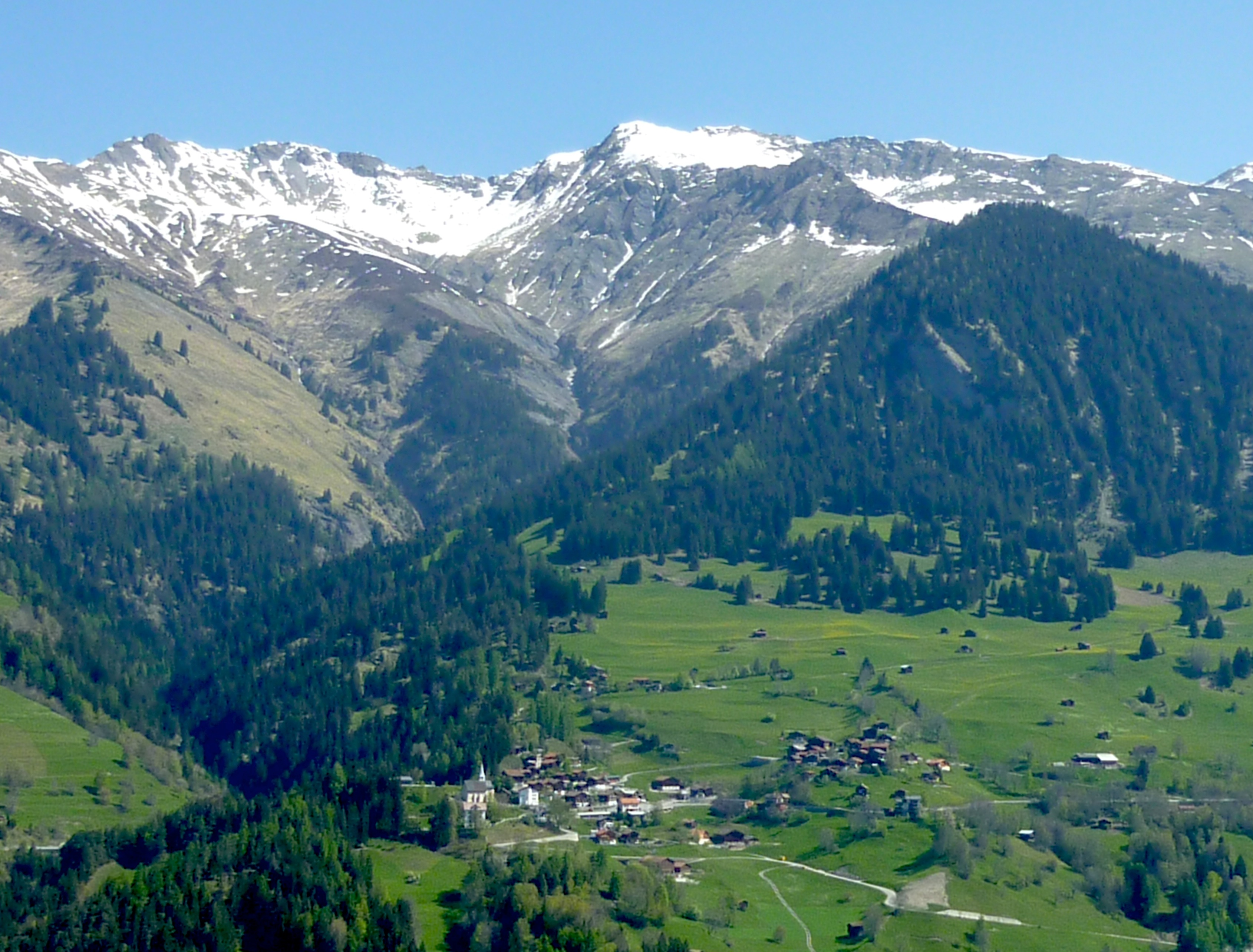 Castiel